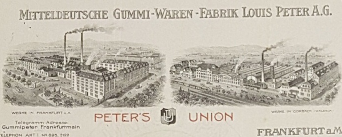 Bild der Fabriken von Louis Peter auf Rechnung